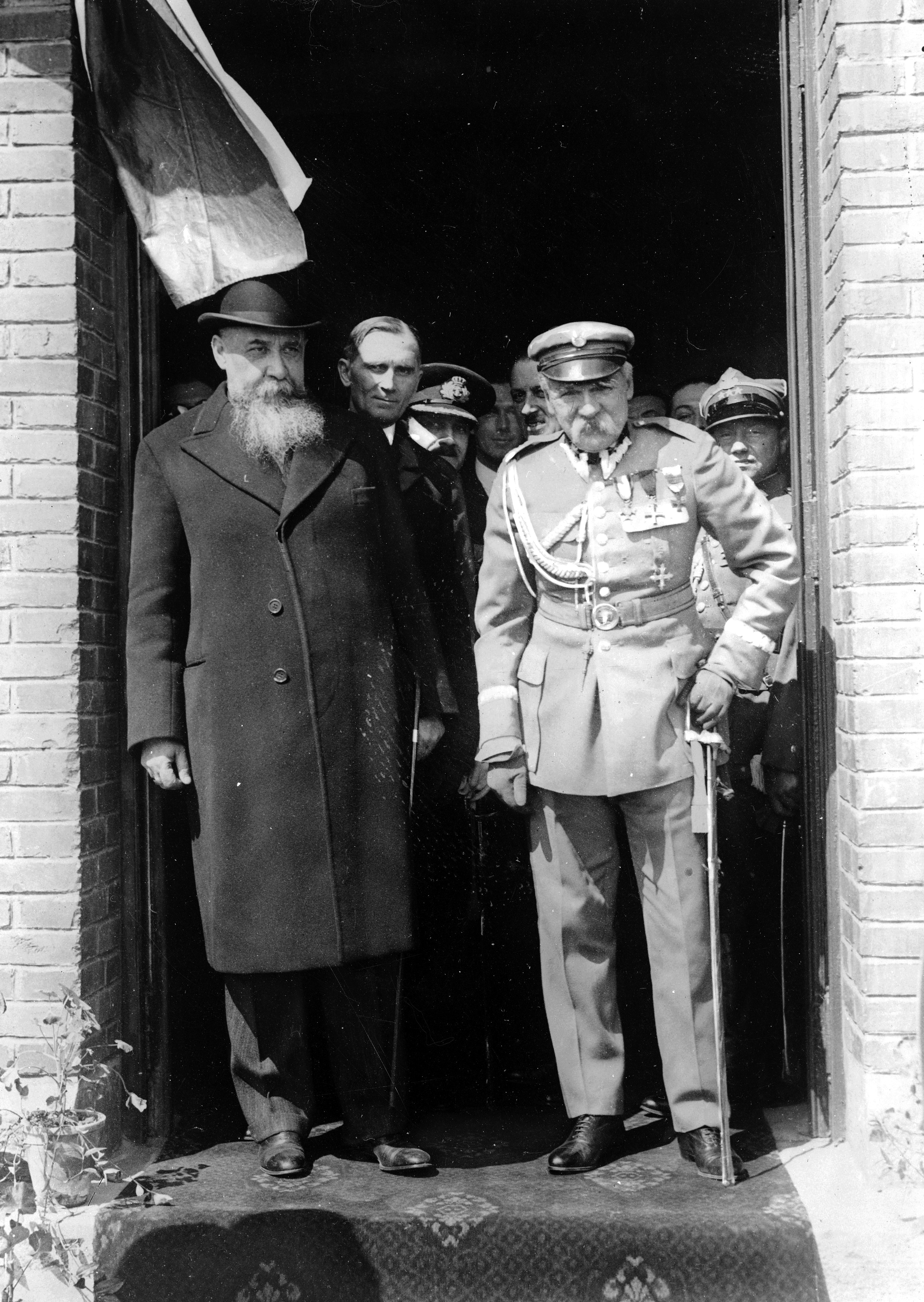 Marszałek Józef Piłsudski i premier Rumunii Nicolae Iorga (z brodą) na dworcu kolejowym w Bukareszcie.